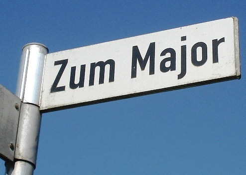 Straßenschild "Zum Major" in Süsel